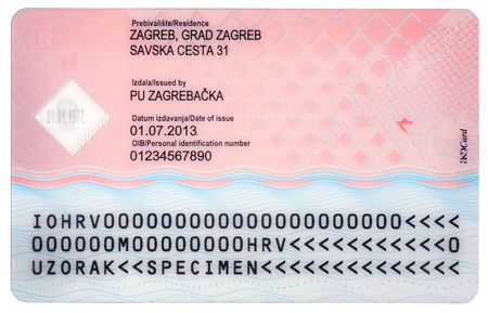 Uzorak osobne iskaznice 2013